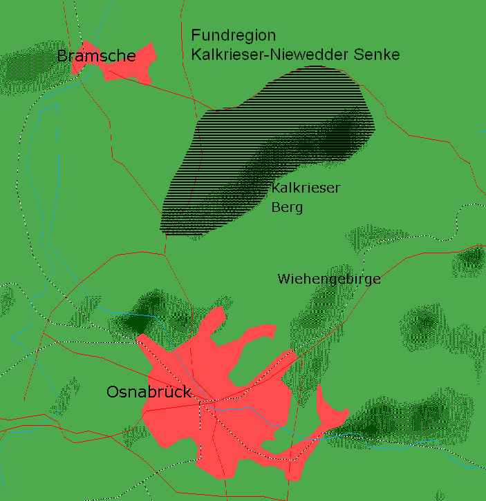 Fundregion Kalkrieser-Niewedder Senke